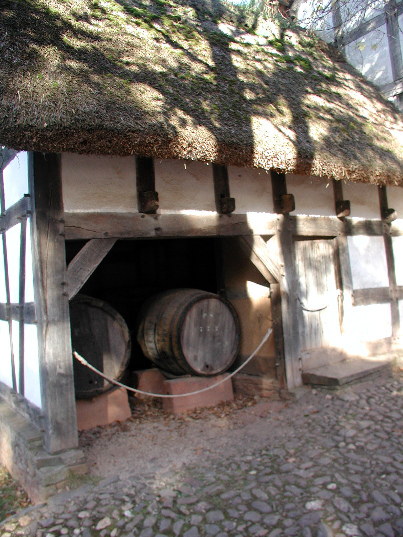 Rheinisches Freilichtmuseum Kommern